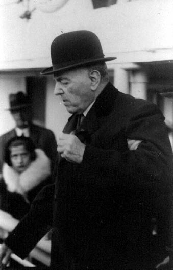 Yrigoyen retorna a Buenos Aires durante su última prisión en la Isla Martín García